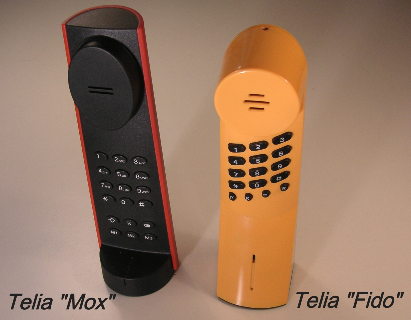 Telias "Mox" och "Fido"